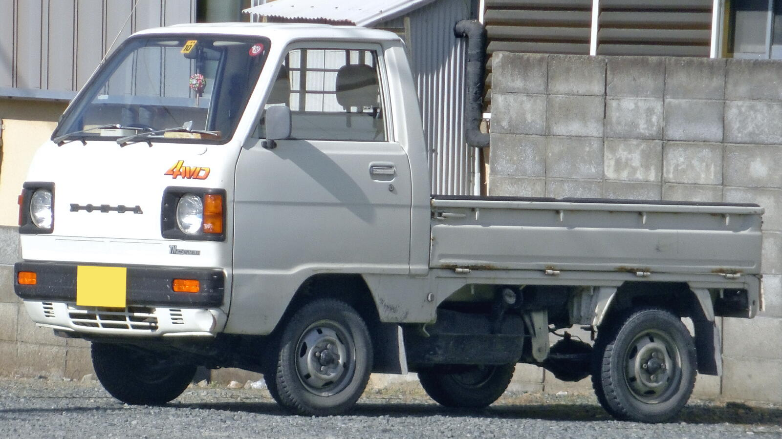 ホンダ・アクティトラック（初代・中期型）